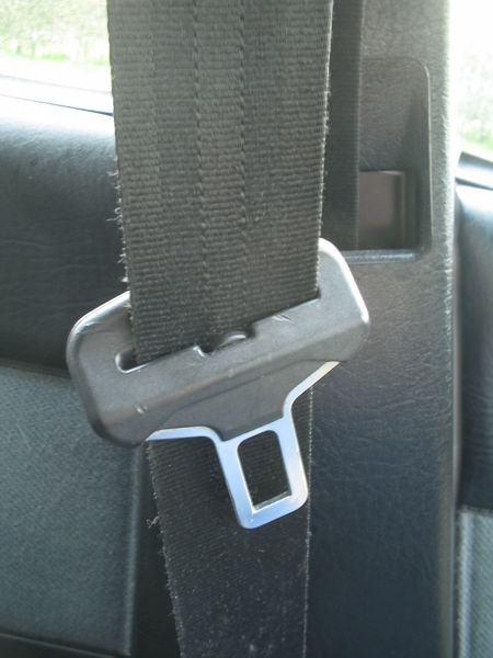 Bezpecnostni pas